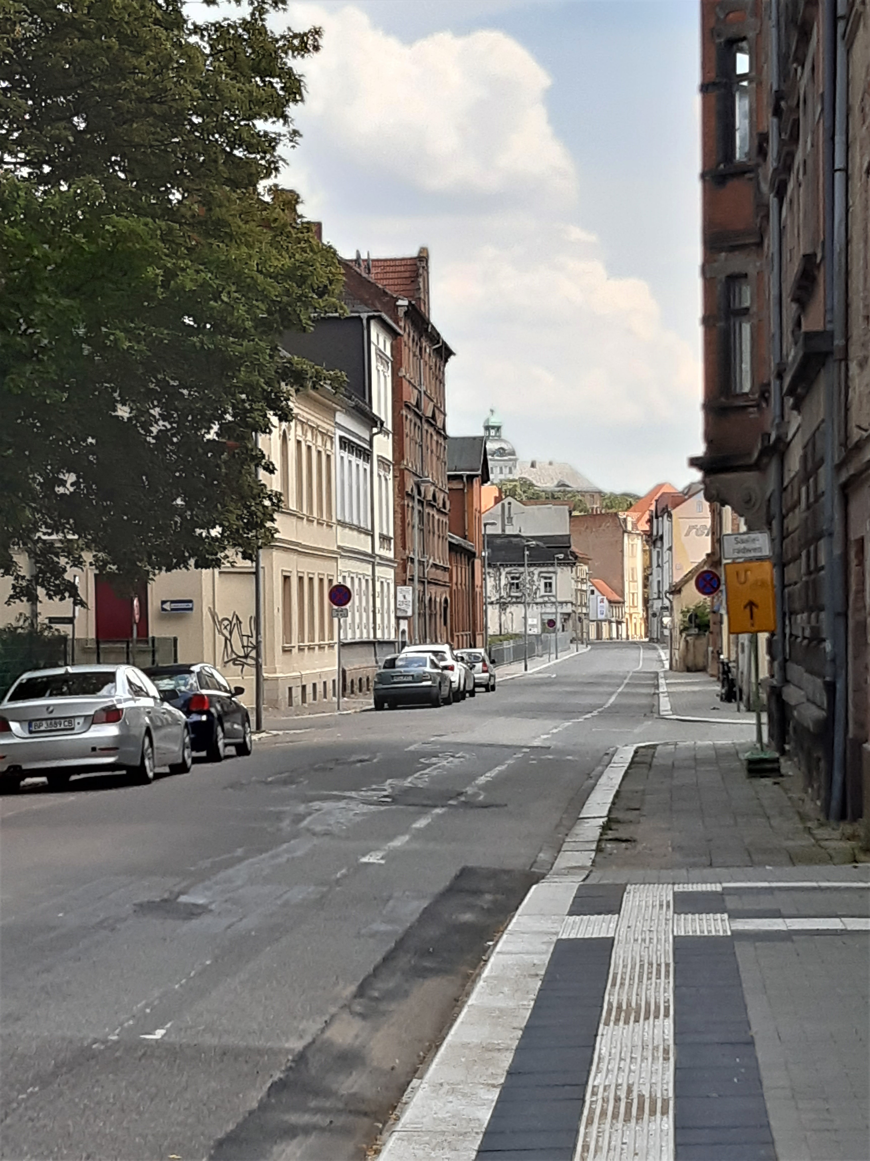 Beuditzstraße in Weißenfels